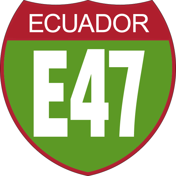 Disco de Identificación Ruta E47